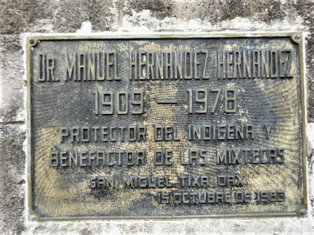 Placa al Dr. Manuel Hernandez Hernandez en San Miguel Tixa, Oaxaca, Mexico.